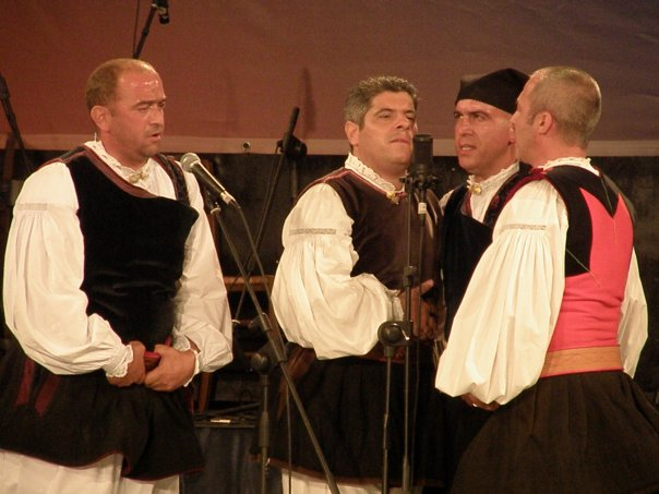 Tenores di Bitti Mialinu Pira al Festival Internazionale del Folklore di Florinas (SS) nell'agosto 2009